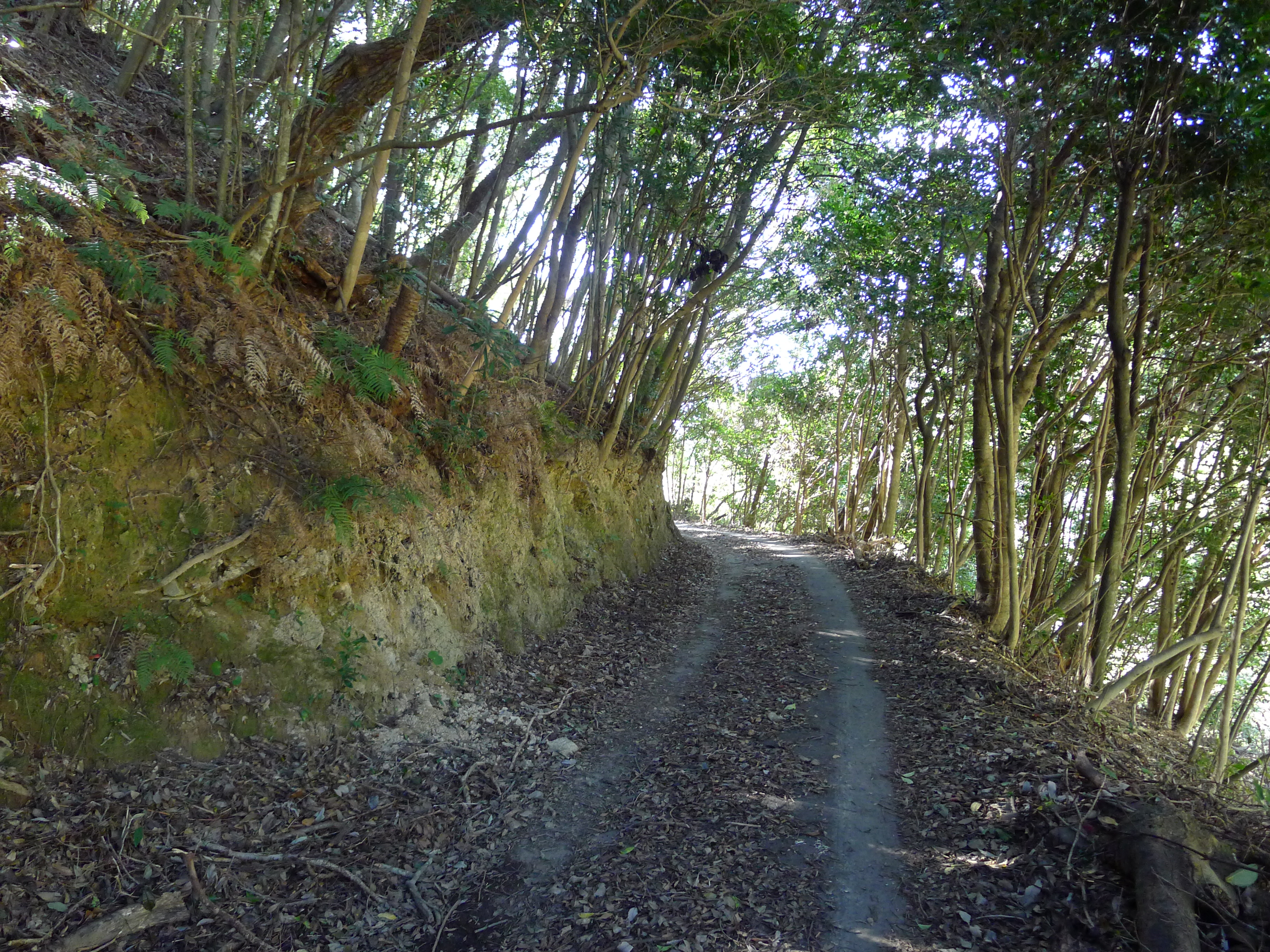 熊野古道紀伊路（和歌山県印南町）